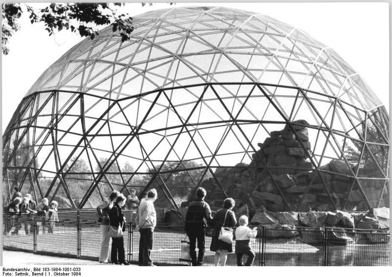 Berlin, Tierpark, Möwen-Flugkäfig ADN-ZB Settnik 1.10.84 Berlin: Möwen-Flugkäfig-Ein Möwen-Flugkäfig ist im Tierpark Berlin seiner Bestimmung übergeben worden. Er hat die Form eines nordischen Vogelberges. Zunächst sind in dem Käfig zwei einheimische Vogelarten und eine südamerikanischen Möwenart untergebracht. In nächster Zeit sollen noch weitere Tierarten hinzugesetzt werden.